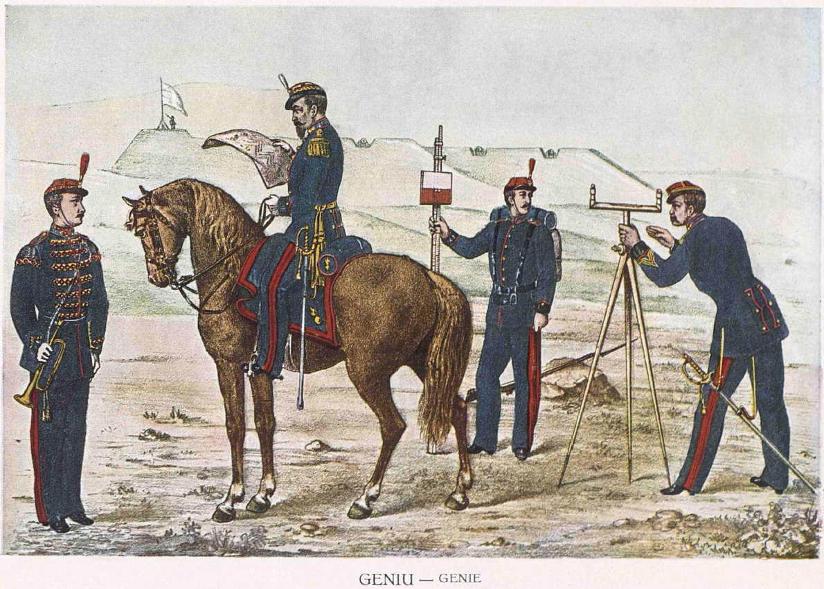 Imaginea prezintă diferitele uniforme ale personalului din arma geniu, în ultima parte a secolului XIX. Imaginea este reprodusă după "Albumul Armatei Române", apărut în 1873 la Stabilimentele lithogragice M. B. Baer, Bucureşti Imaginea poate fi folosită fără restricţii, fiind în domeniul public de la apariţie